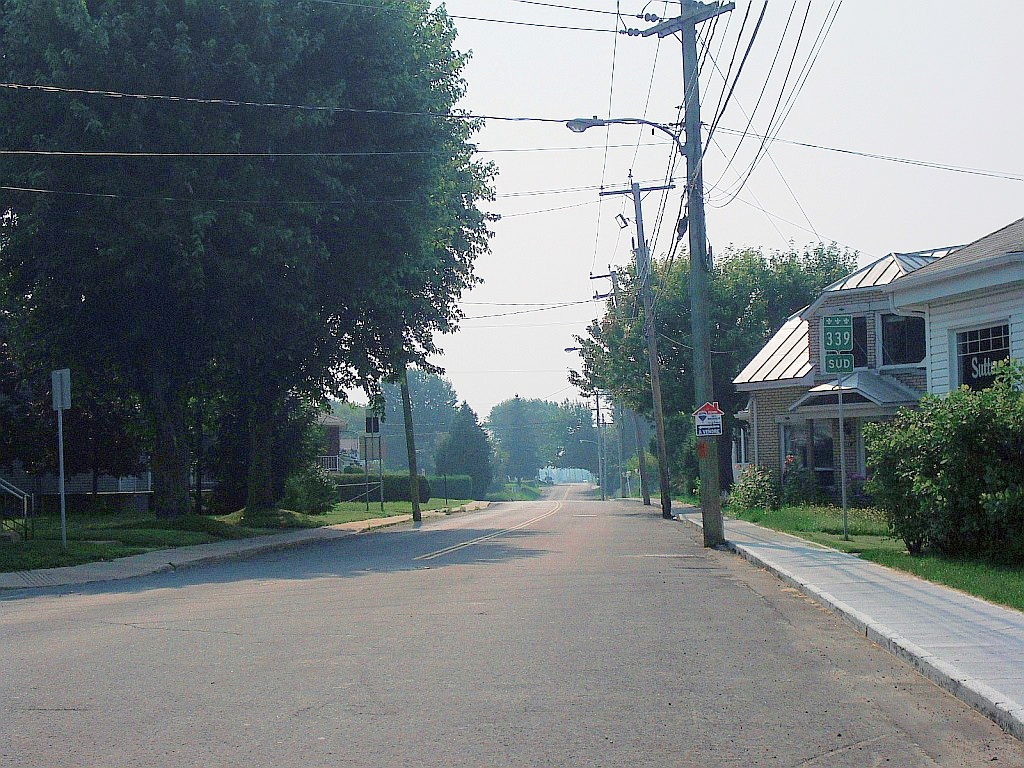 Vue sur la route 339, dans la municipalité de Saint-Lin-Laurentides (région de Lanaudière), Québec, Canada.